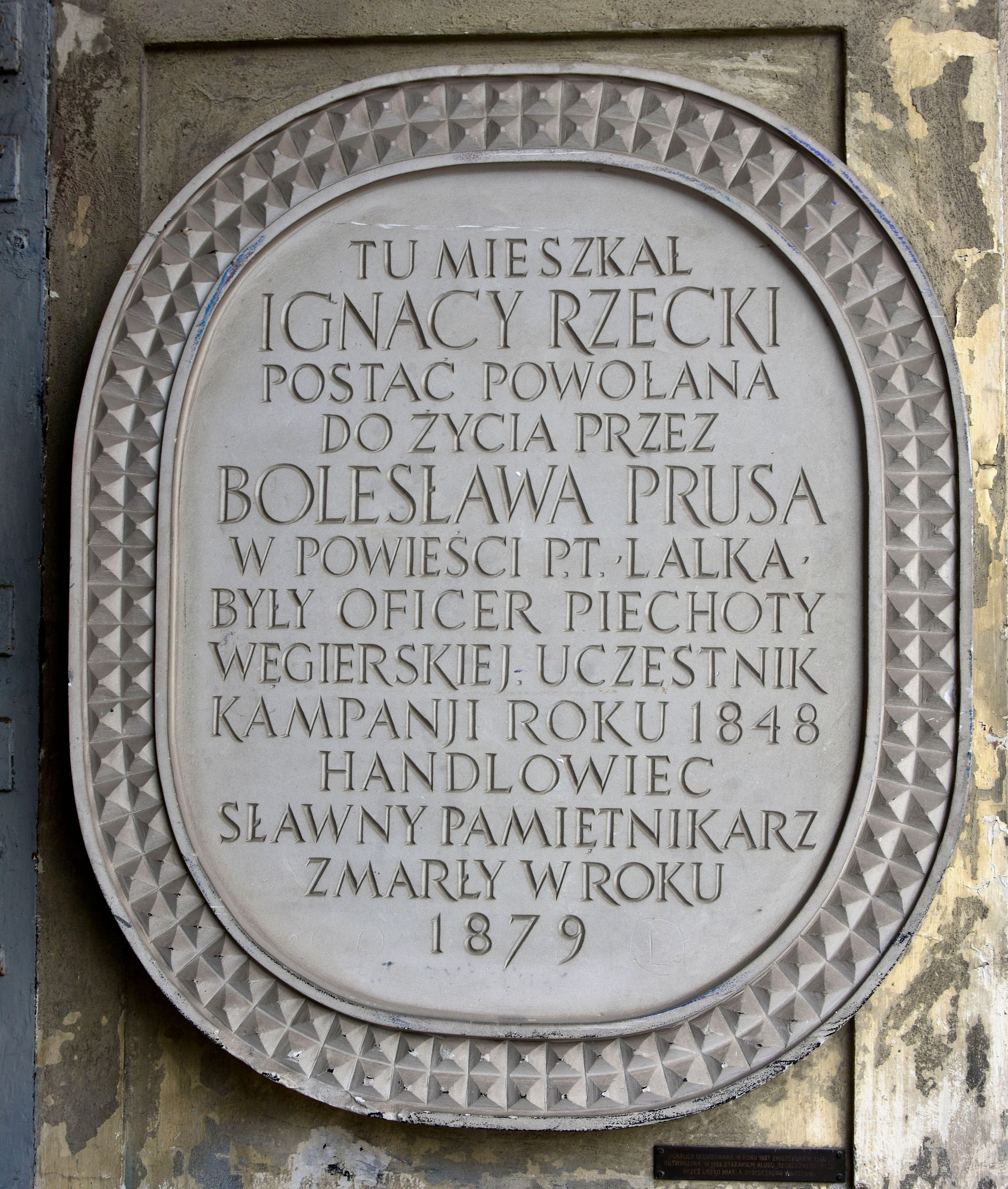 Tablica upamiętniająca Ignacego Rzeckiego w bramie kamienicy Józefa Grodzickiego przy ul. Krakowskie 7 w Warszwie